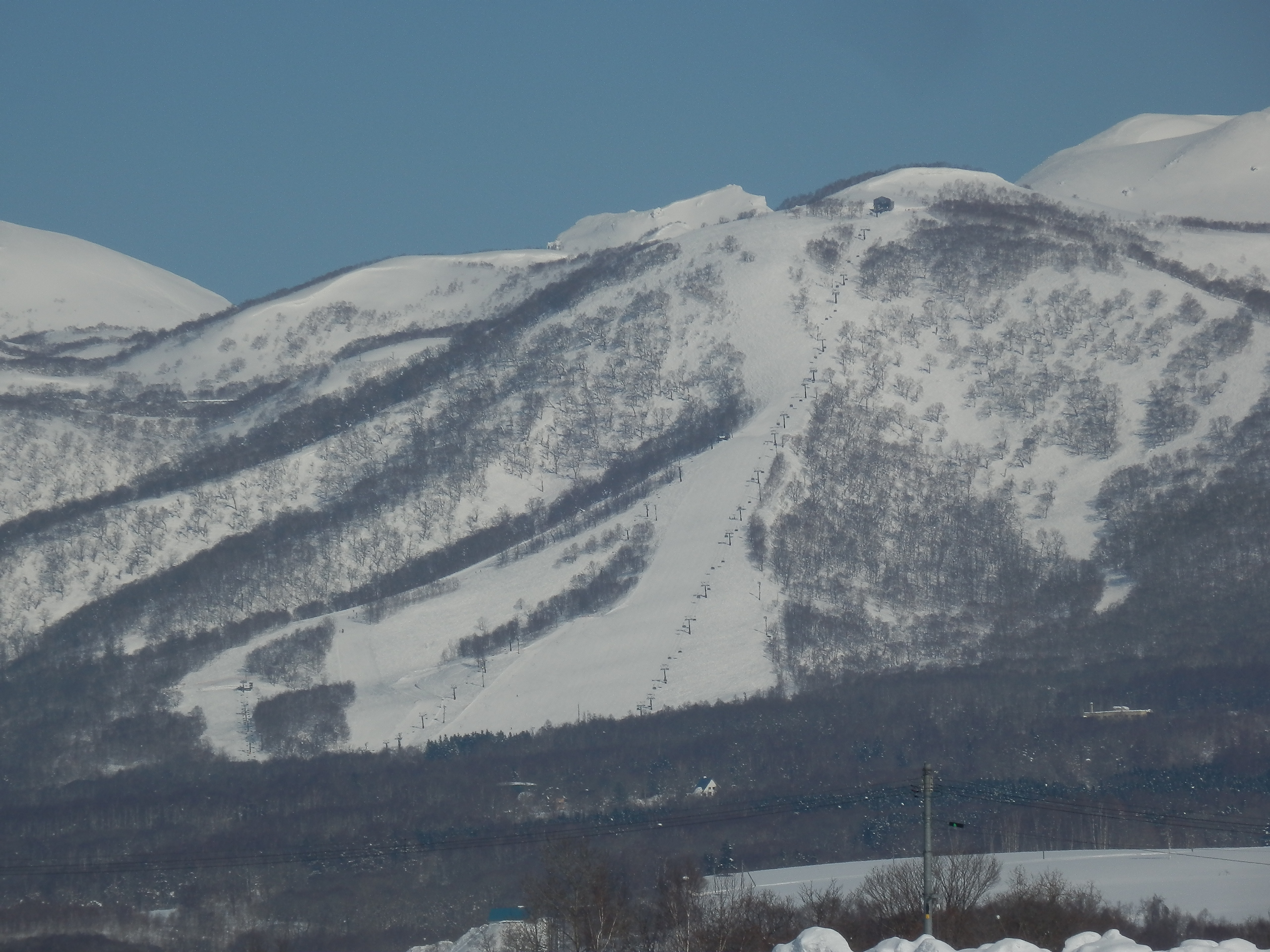 ニセコモイワスキー場遠景